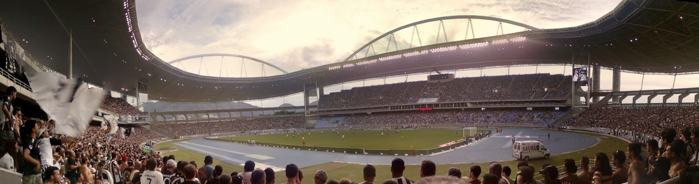 Foto panorâmica do Estádio Olímpico João Havelange, no dia 12 de outubro de 2009, partida Botafogo 2-2 Avaí, quando o local recebeu seu maior público (cerca de 50 mil pessoas - 33.641 pagantes) devido a problemas na venda de ingressos e acesso de torcedores, o que obrigou a abertura dos portões e entrada gratuita do público.